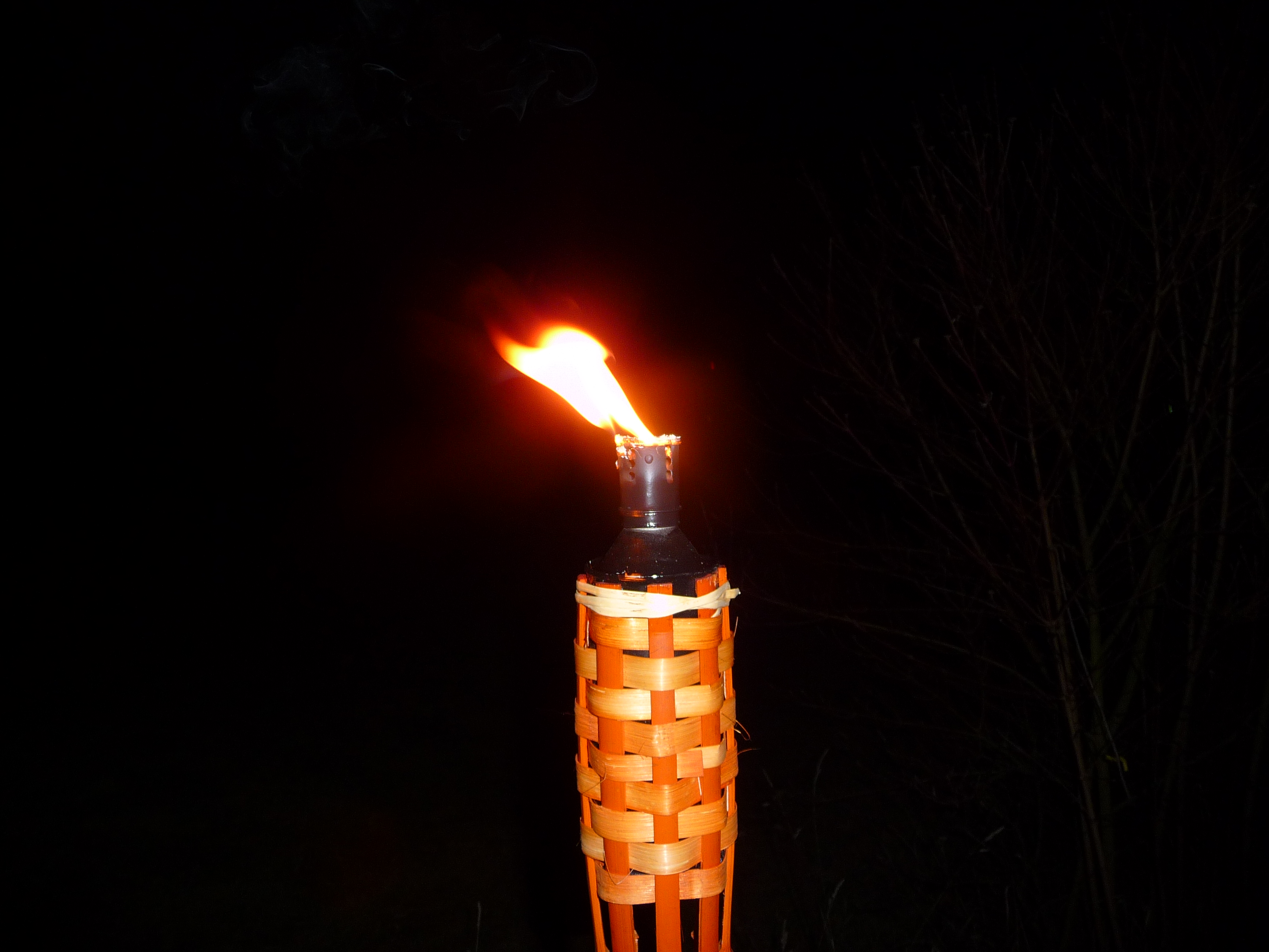 Fackel mit Brennstoff Petroleum